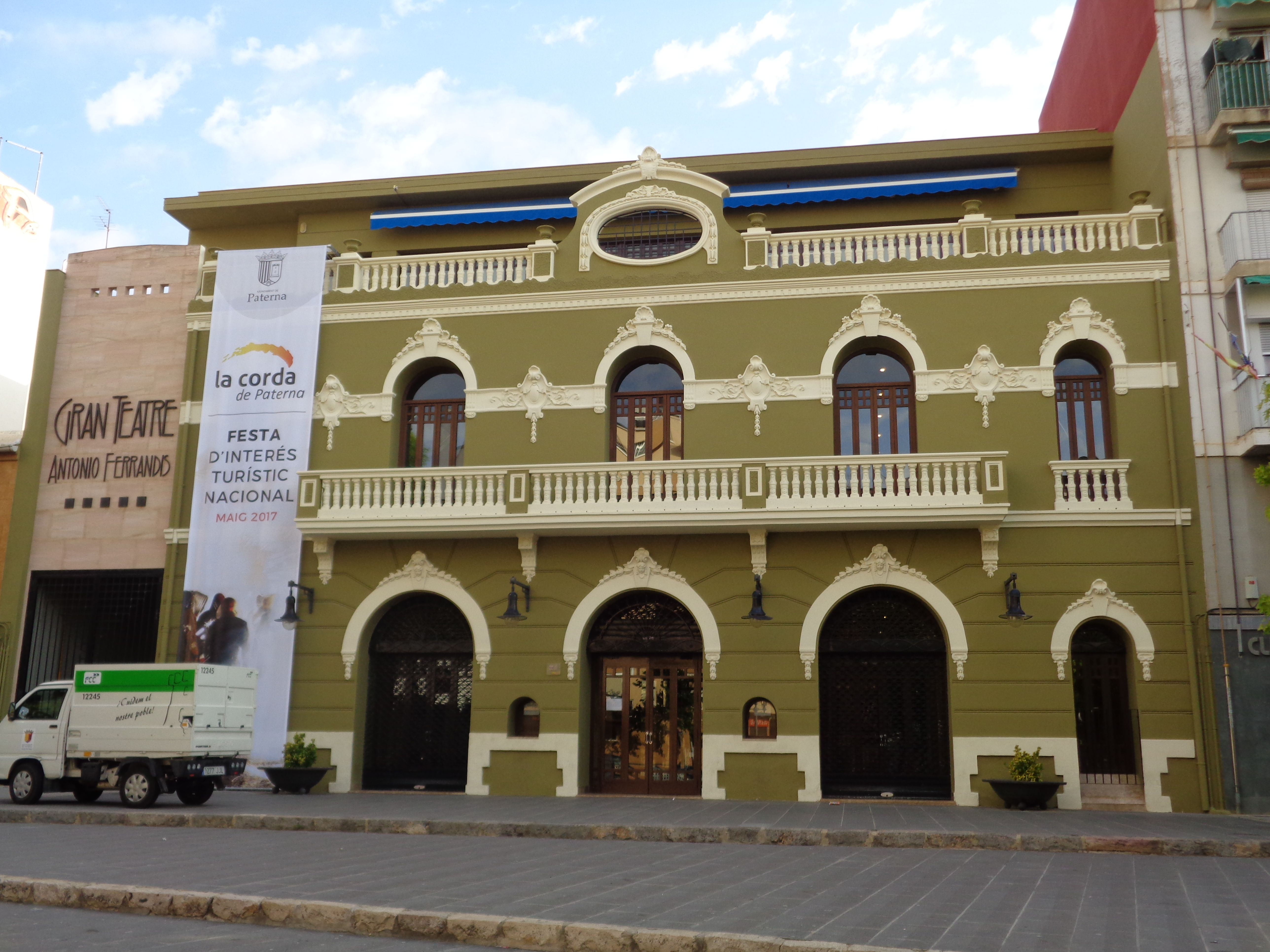 Teatre Antonio Ferrandis.